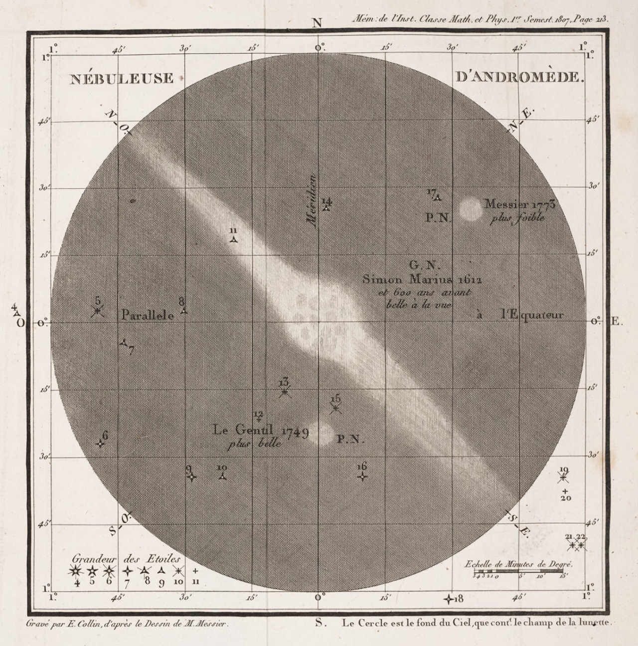 Messier's Drawings of M31/32/110